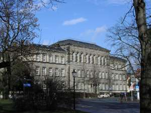 Altbau des Max-Planck-Gymnasiums in Göttingen.